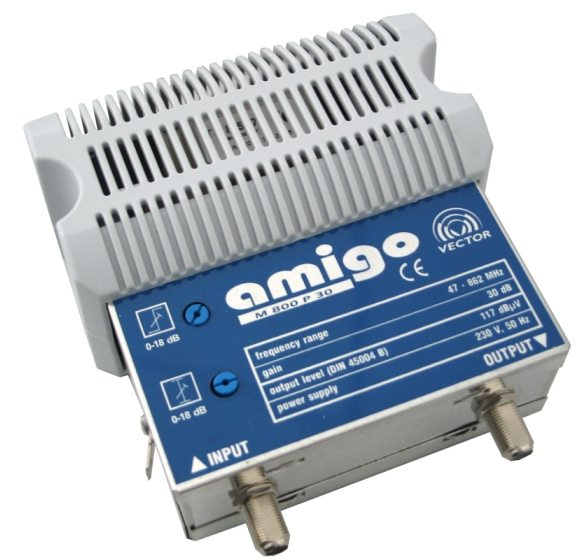 Przykład wzmacniacza budnkowego stosowanego w sieciach HFC